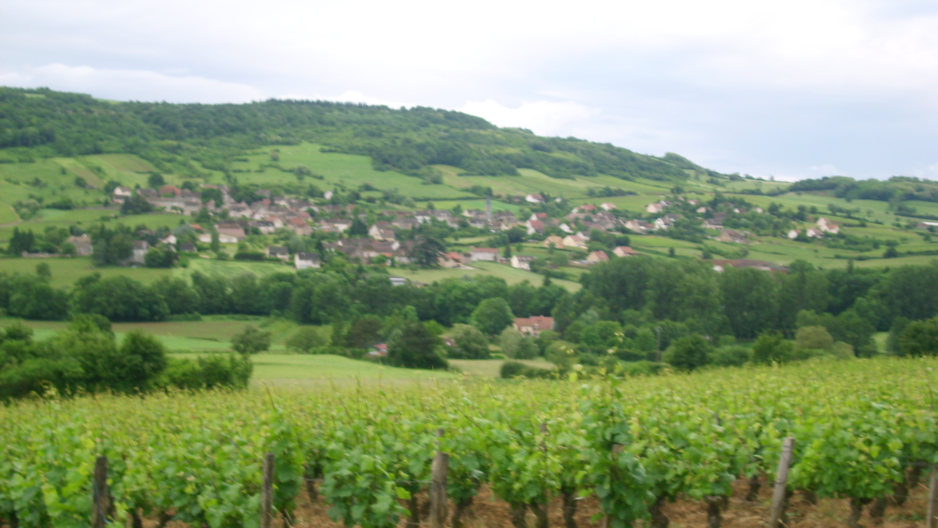 Vue du village de Saint-Denis-de-Vaux (71)